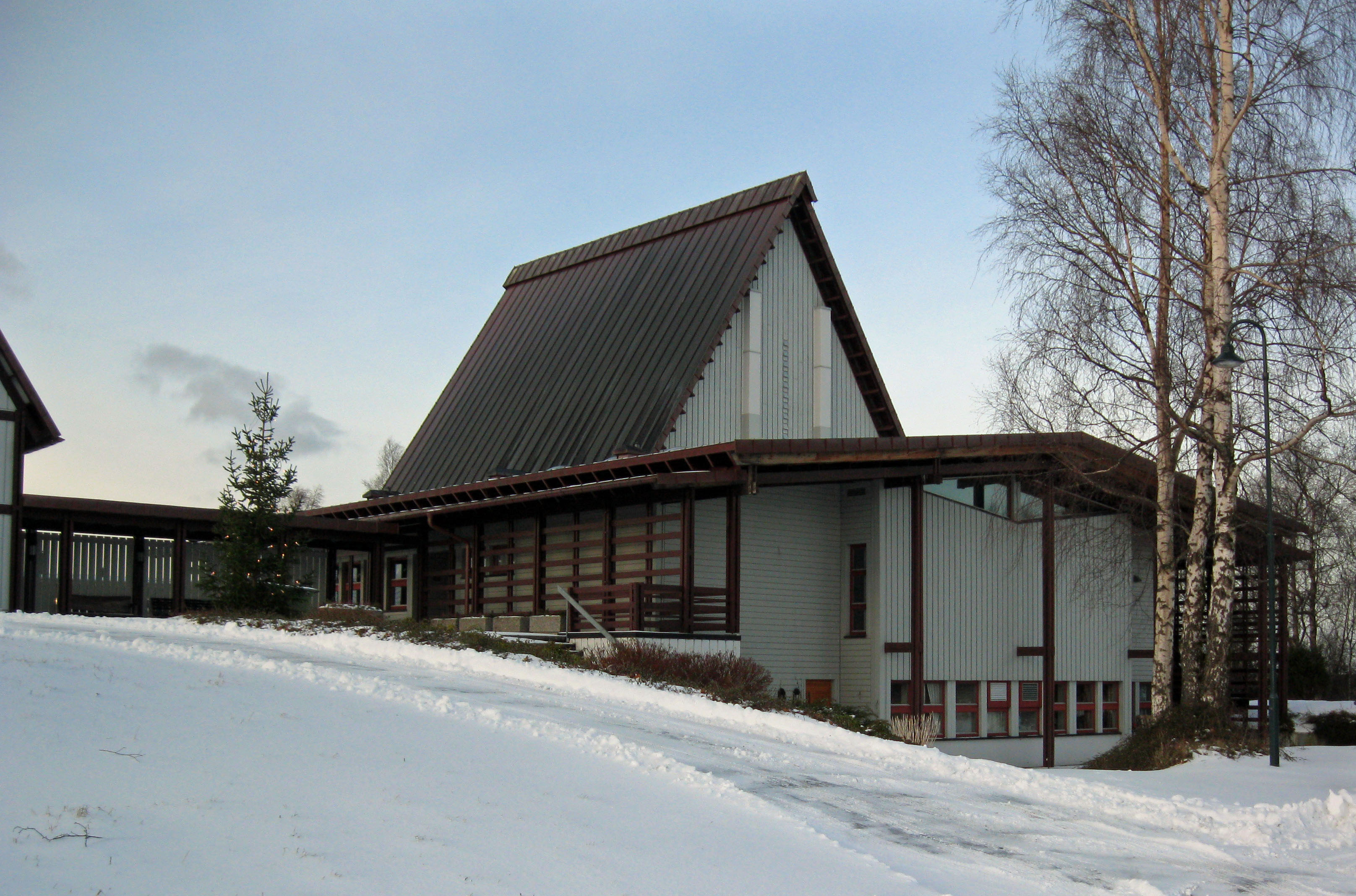 Indre Sula kyrkje, 6037 Eidsnes